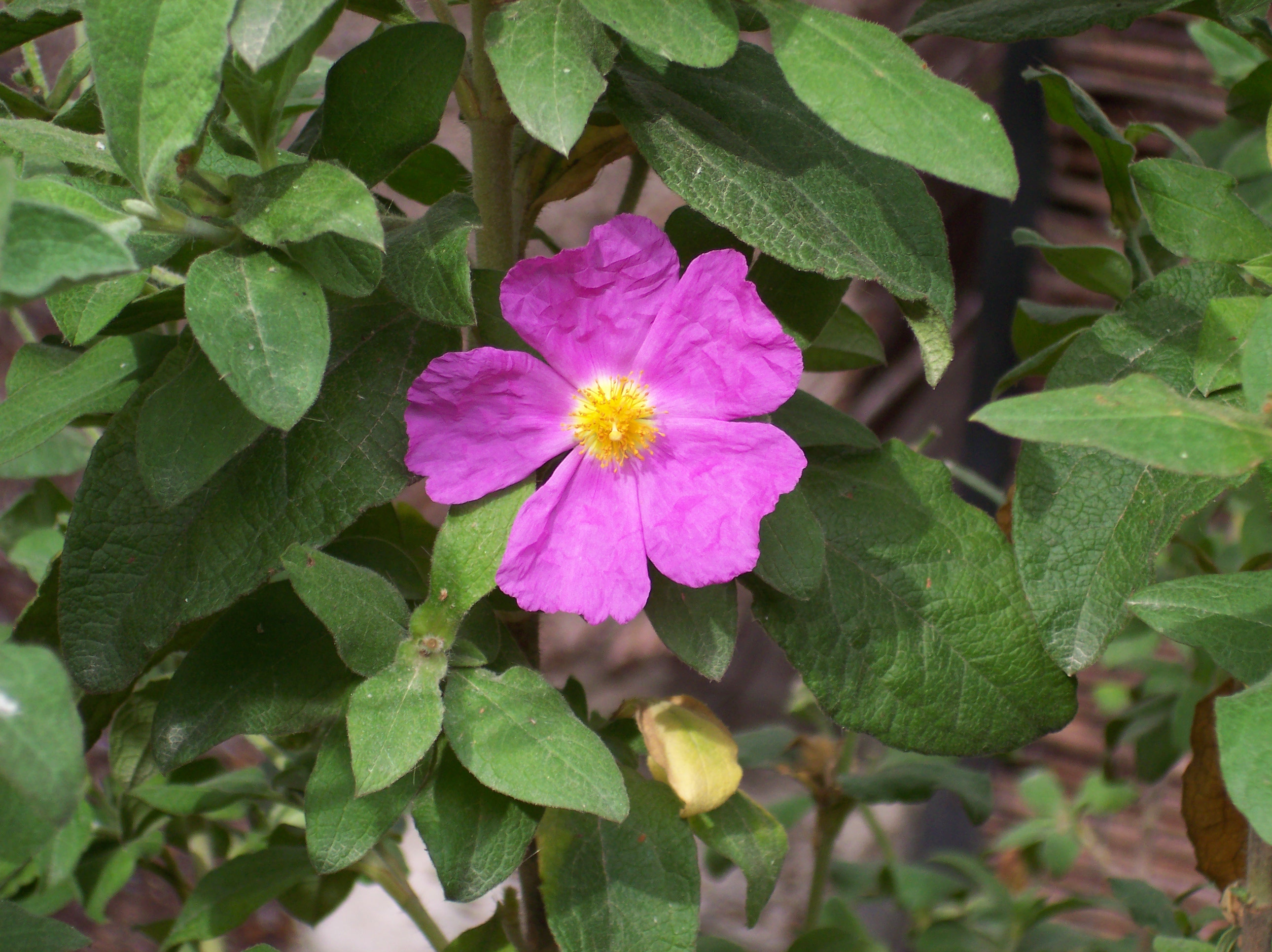 Cistus symphytifolius. Real Jardín Botánico de Madrid.